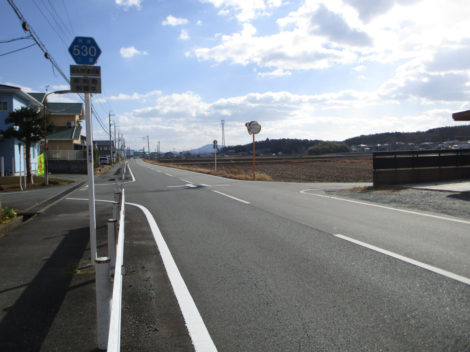 三重県道530号田丸停車場斎明線（サニーロード、三重県多気郡明和町有爾中より撮影）